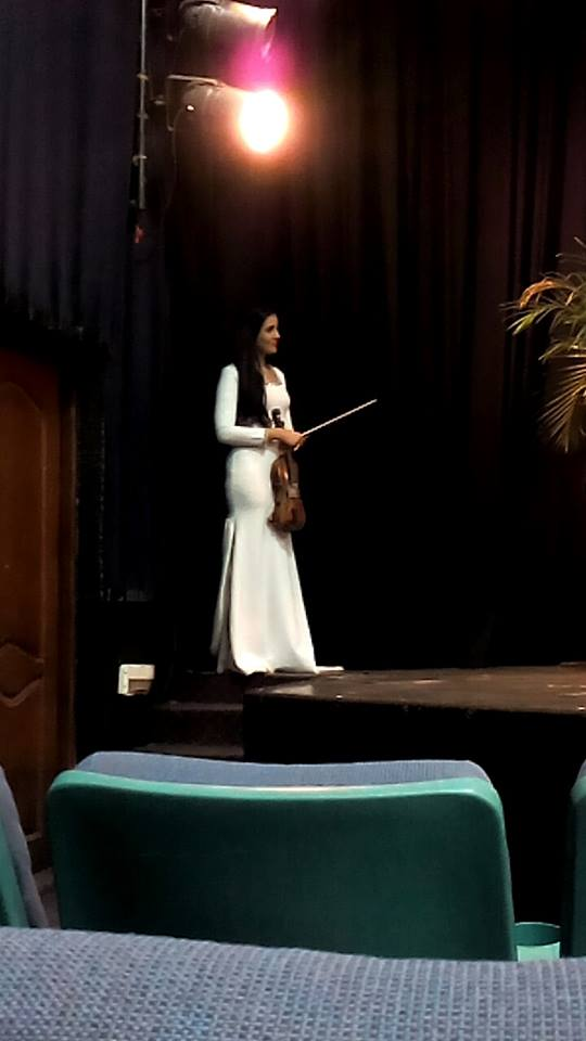 Aisha Syed